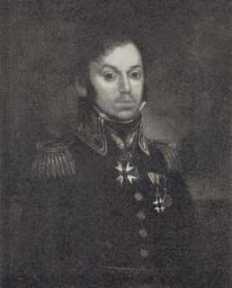 Carl Johan af Wirsén, född 1777, död 1825, var en svensk viceamiral